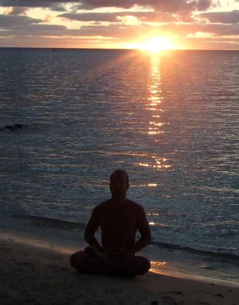 Méditation sur une plage de Mo'orea (15 km de Tahiti)